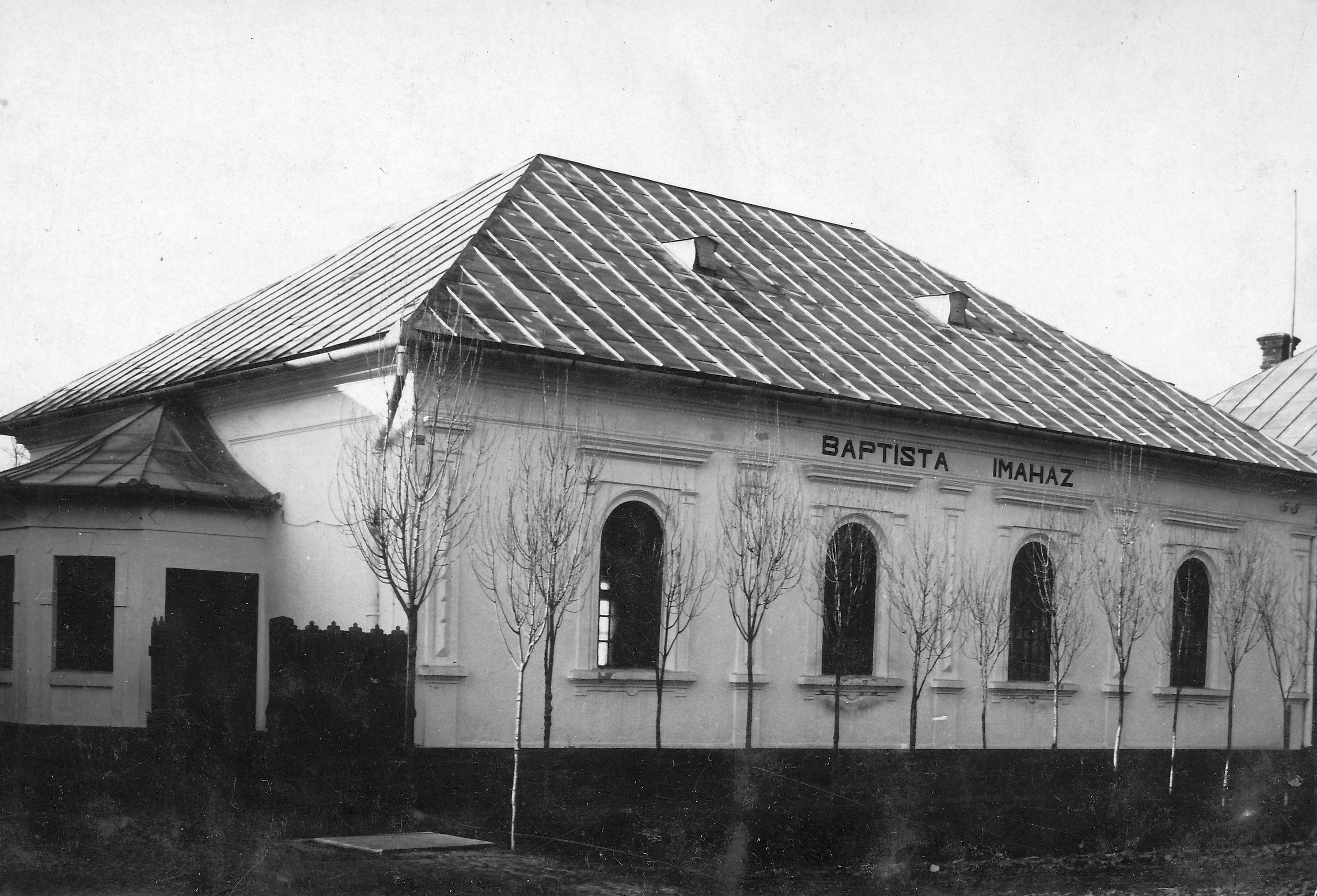 baptista imaház (eredetileg zsinagóga). Location: Nyíracsád, Hungary Tags: public building Title: baptista imaház (eredetileg zsinagóga).